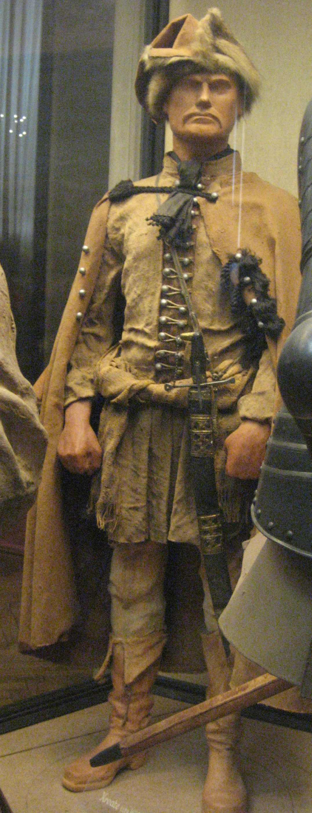 Pic made in the "Heeresgeschichtlches Museum" in Vienna